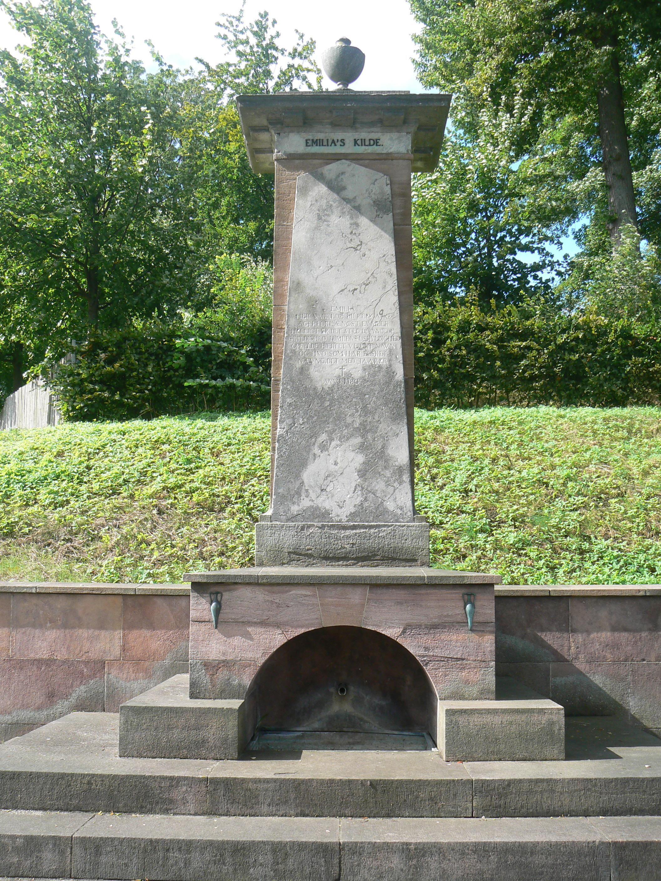 Emiliekilde - Mindesmærke rejst af H. E. Schimmelmann til minde om hans hustru. Det er tegnet af Nicolai Abraham Abildgaard (1743-1809).